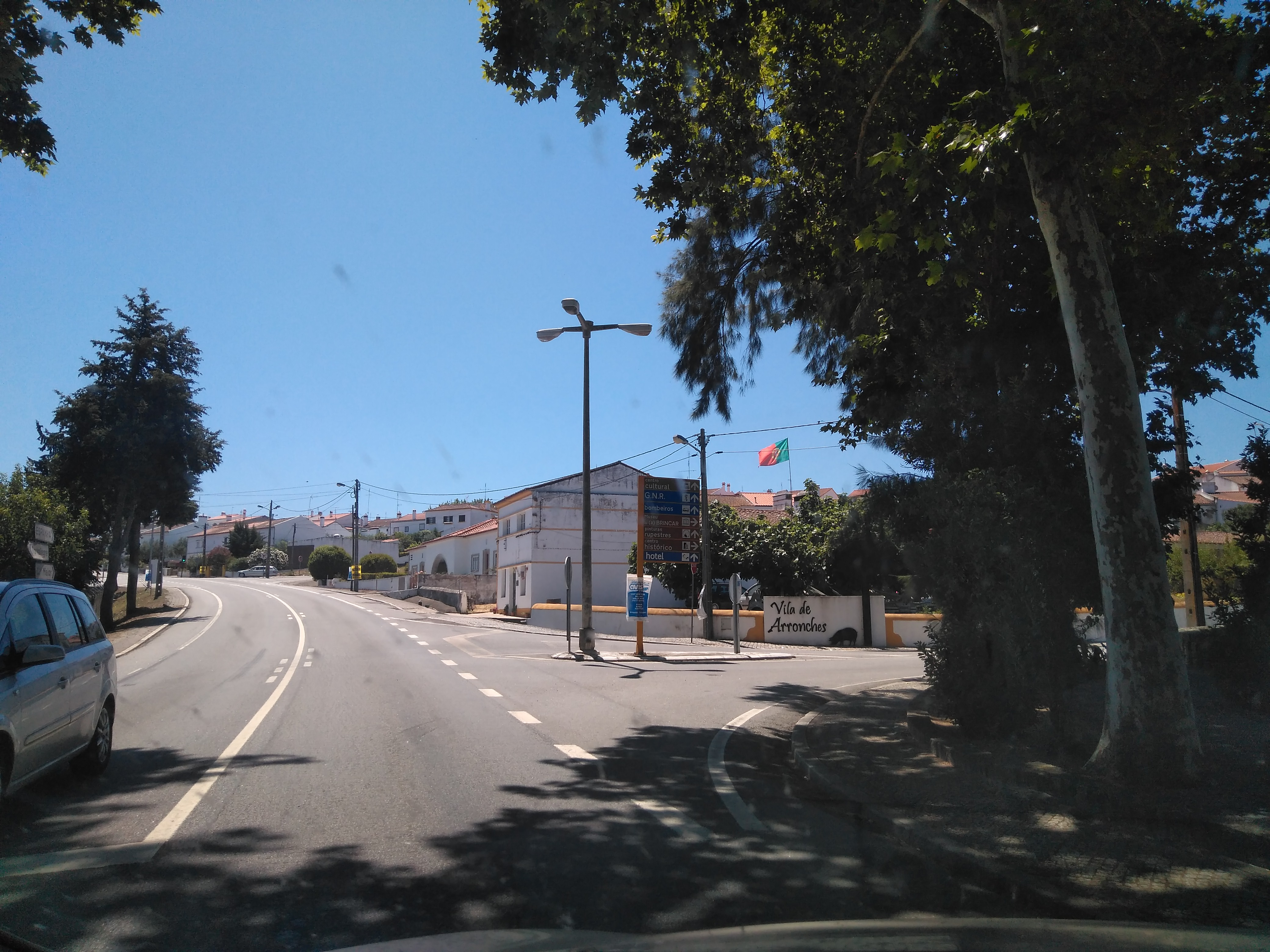 Arronches desde la travesía que lo cruza